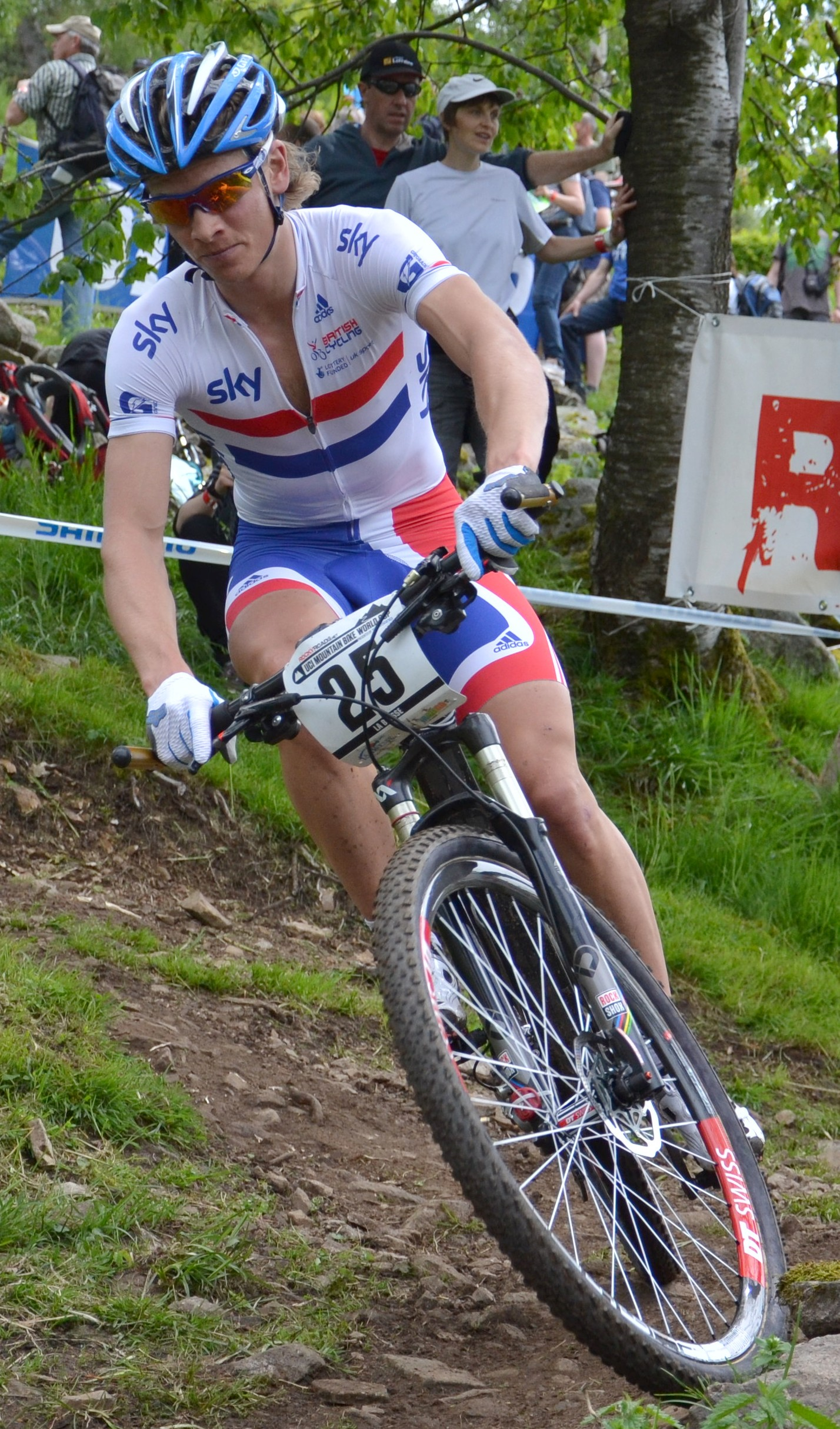 Liam Killeen lors de la 4e manche de la coupe du monde de VTT 2012 à La Bresse (FRA).